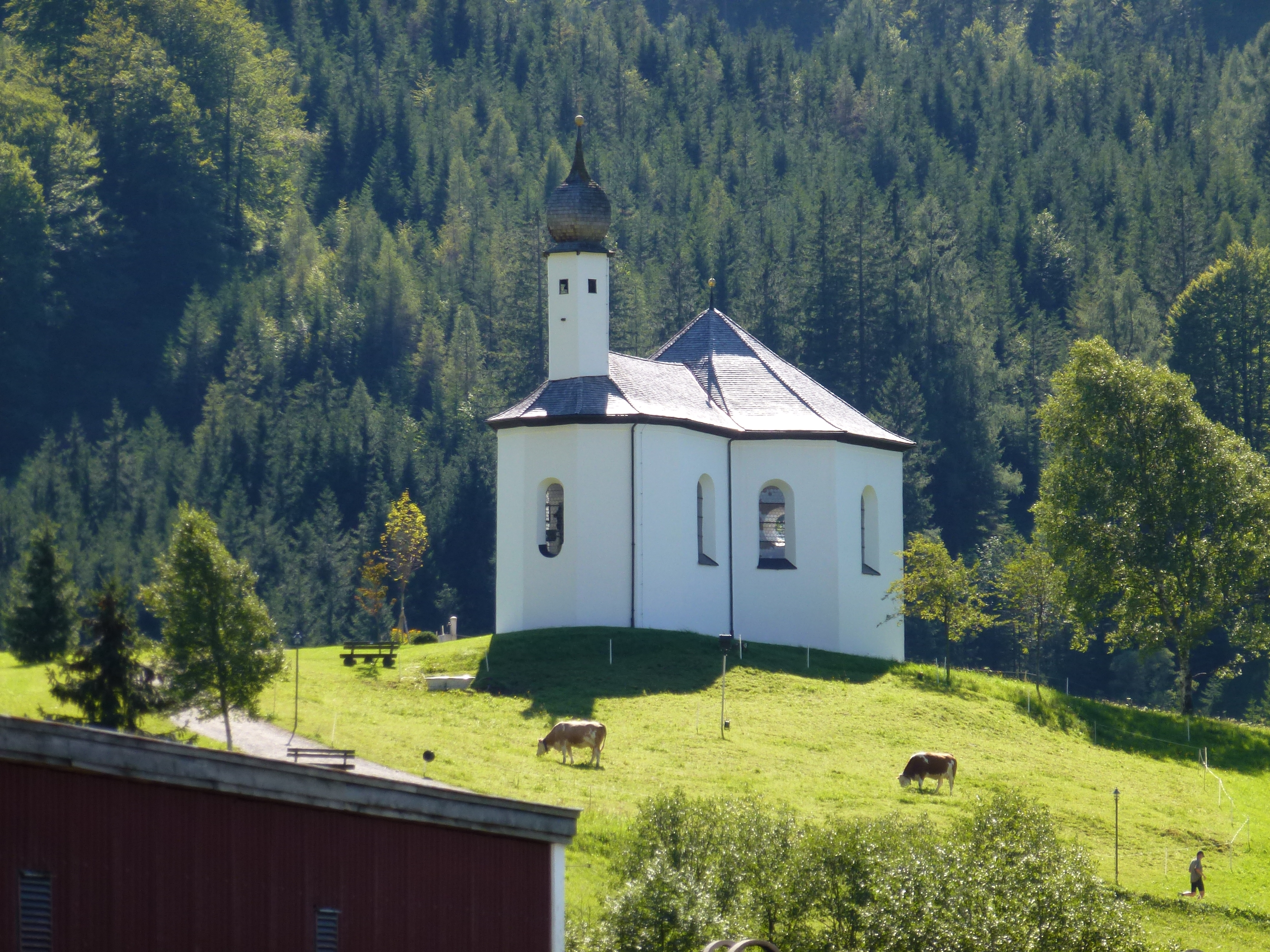 Annenkapelle - Achenkirch